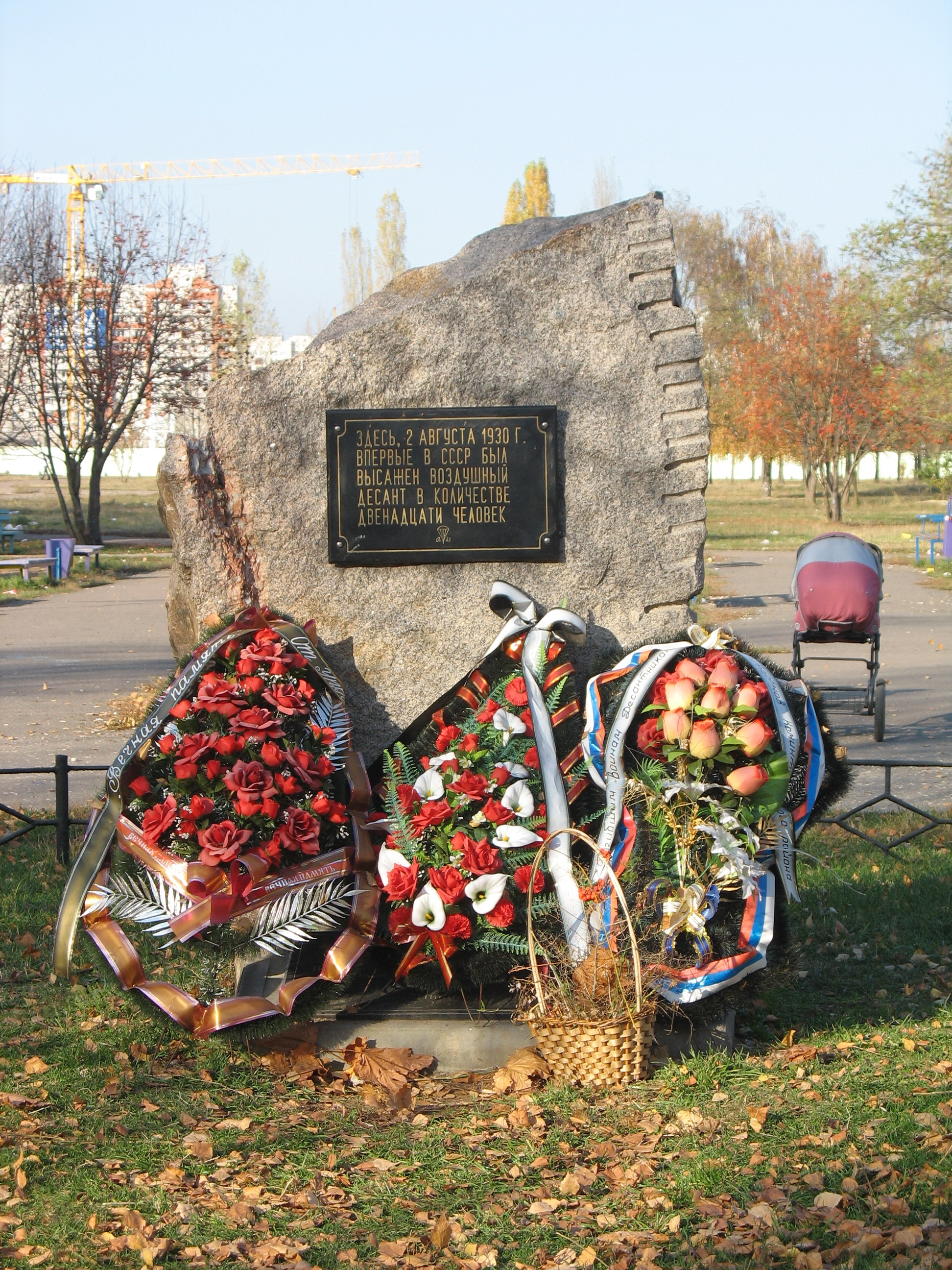 Памятный знак на месте высадки первого десанта в СССР (Воронеж) Надпись на табличке: "Здесь, 2 августа 1930 г. впервые в СССР был высажен воздушный десант в количестве двенадцати человек"